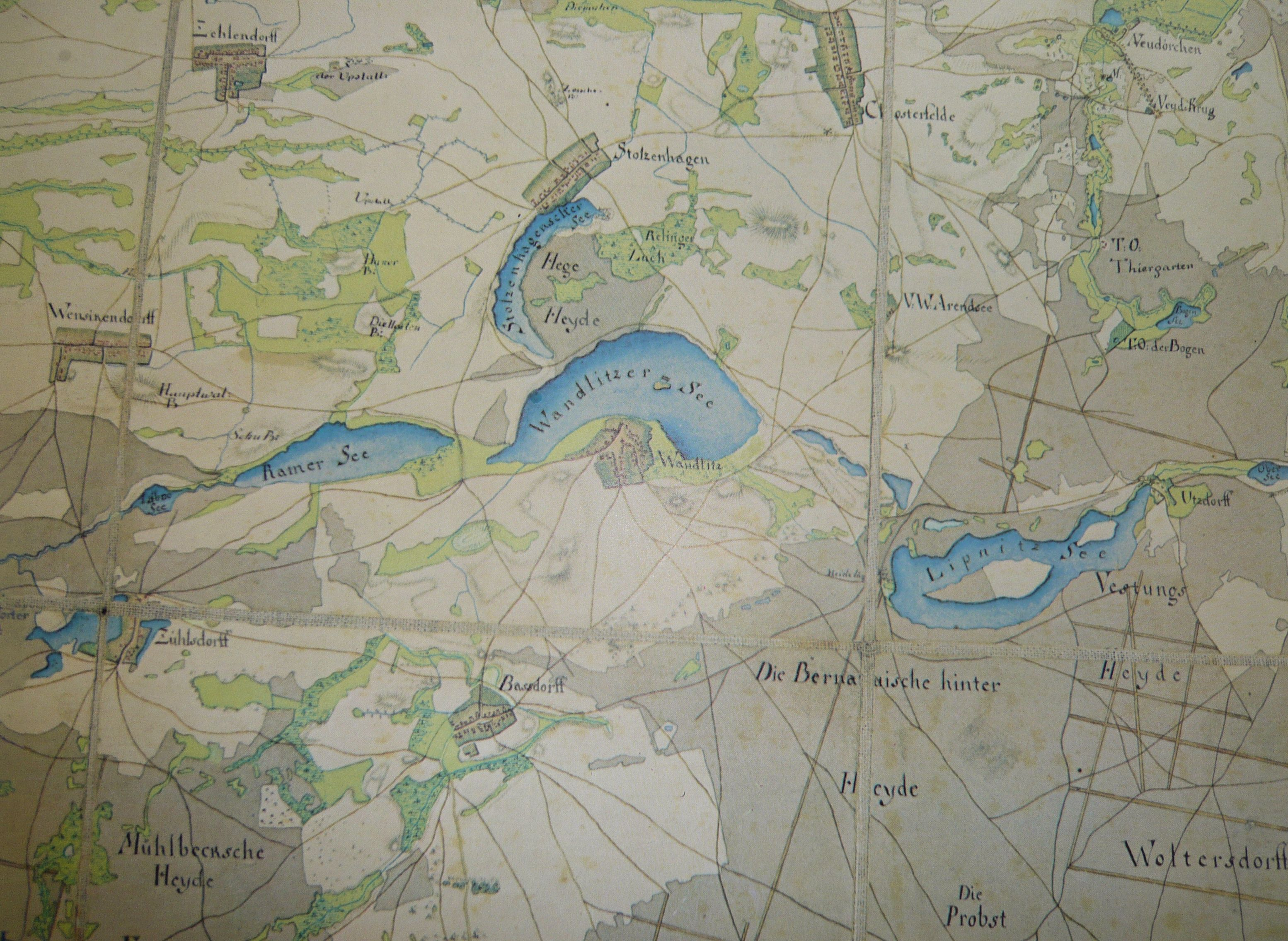 Wandlitz: Ausschnitt einer Flurkarte "Berlin und Umgebung" von 1774/75, Schulenburg-Schmettau-Verlag